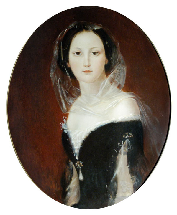 Елизавета Васильевна Толстая (1827—1877), дочь симбирских помещиков В. А. Толстого, с 1857 года жена Александра Илларионовича Мусина-Пушкина (ум.1863). Адресат писем И. А. Гончарова, по мнению исследователей была одним из прообразов Ольги Ильинской.